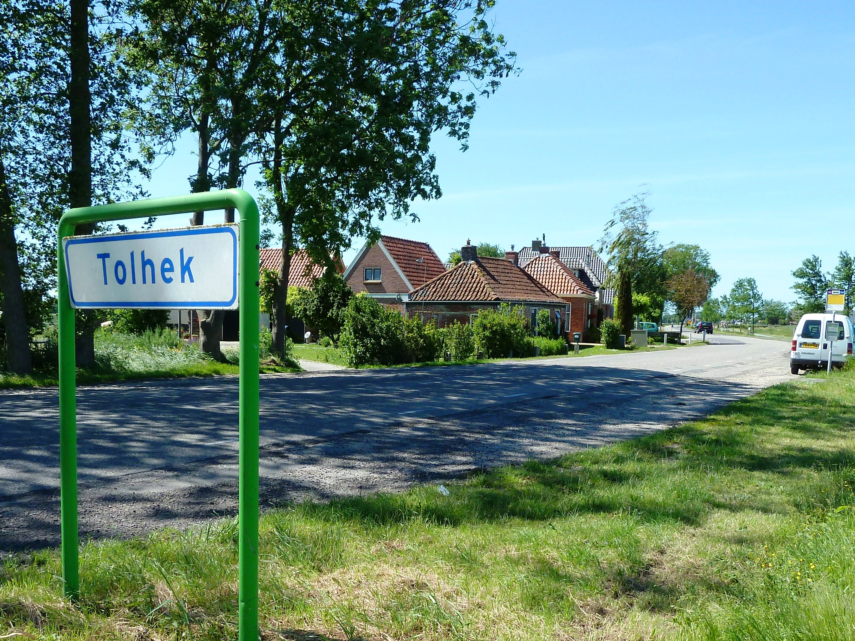 Tolhek (gehucht tussen Den Ham en Aduard, Groningen, Nederland).